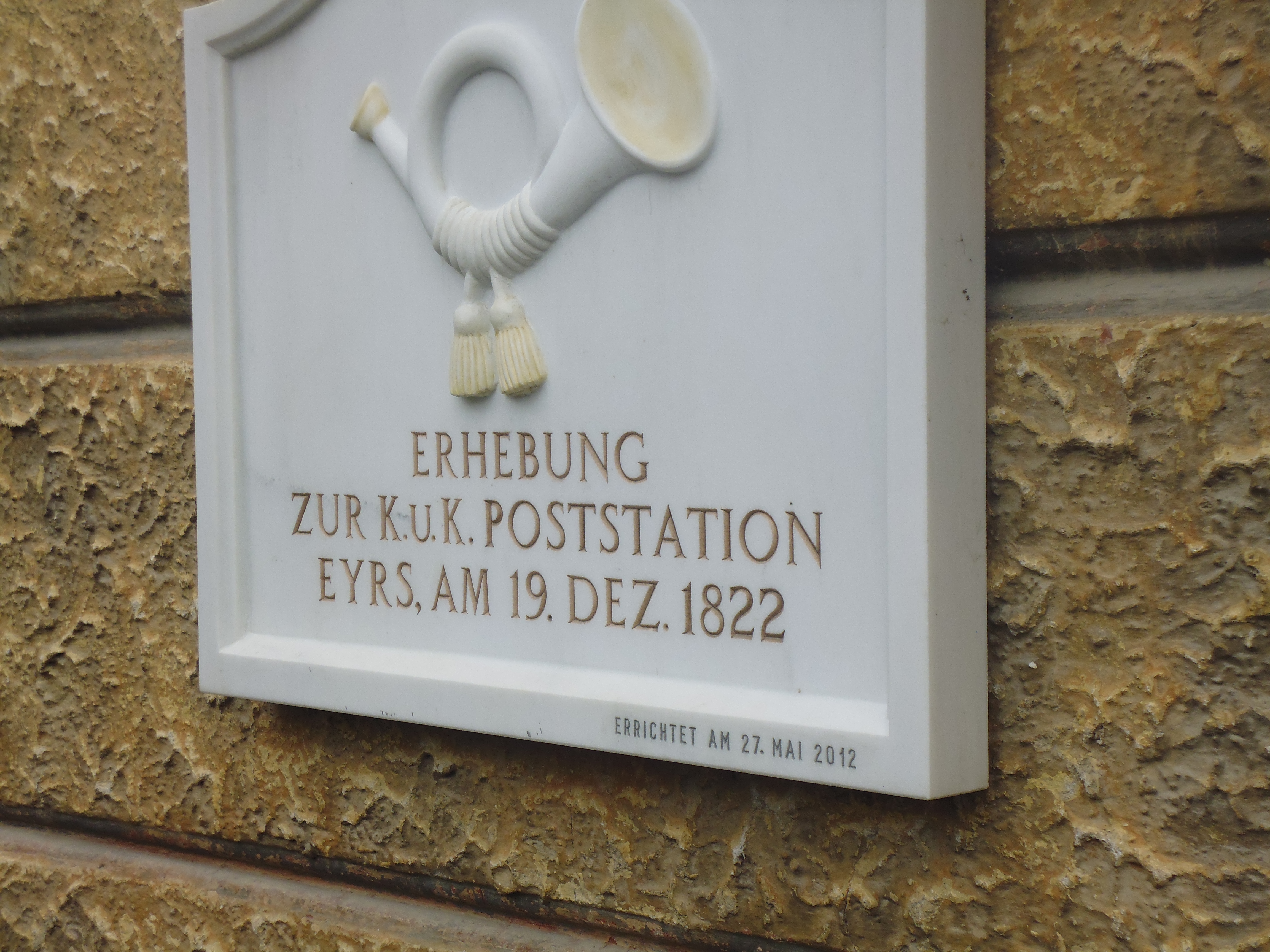 Ansichten von Eyrs in Südtirol